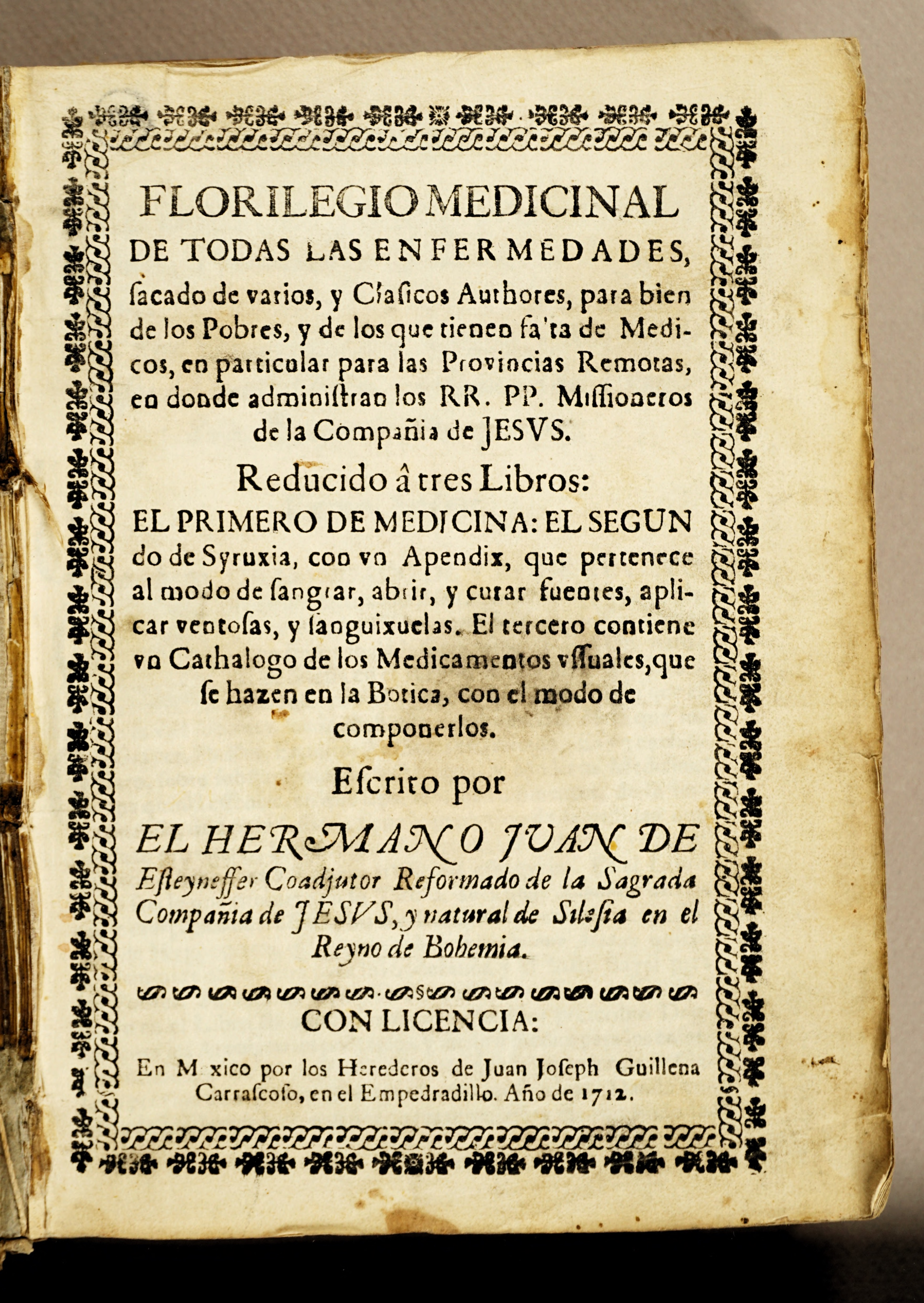 Portada del Florilegio Medicinal​, un libro con ilustraciones y descripciones botánicas que fue escrito por el jesuita alemán de Moravia, Juan de Esteyneffer y publicado en el año 1712. Esta obra compila una combinación de la medicina tradicional del Nuevo Mundo y la europea y el diagnóstico médico europeo del siglo XVIII.